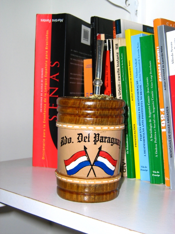 Una guampa de Terere hecha de madera (palo santo).